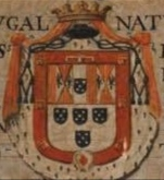 escudo del obispo de m Diego Melo de Portugal